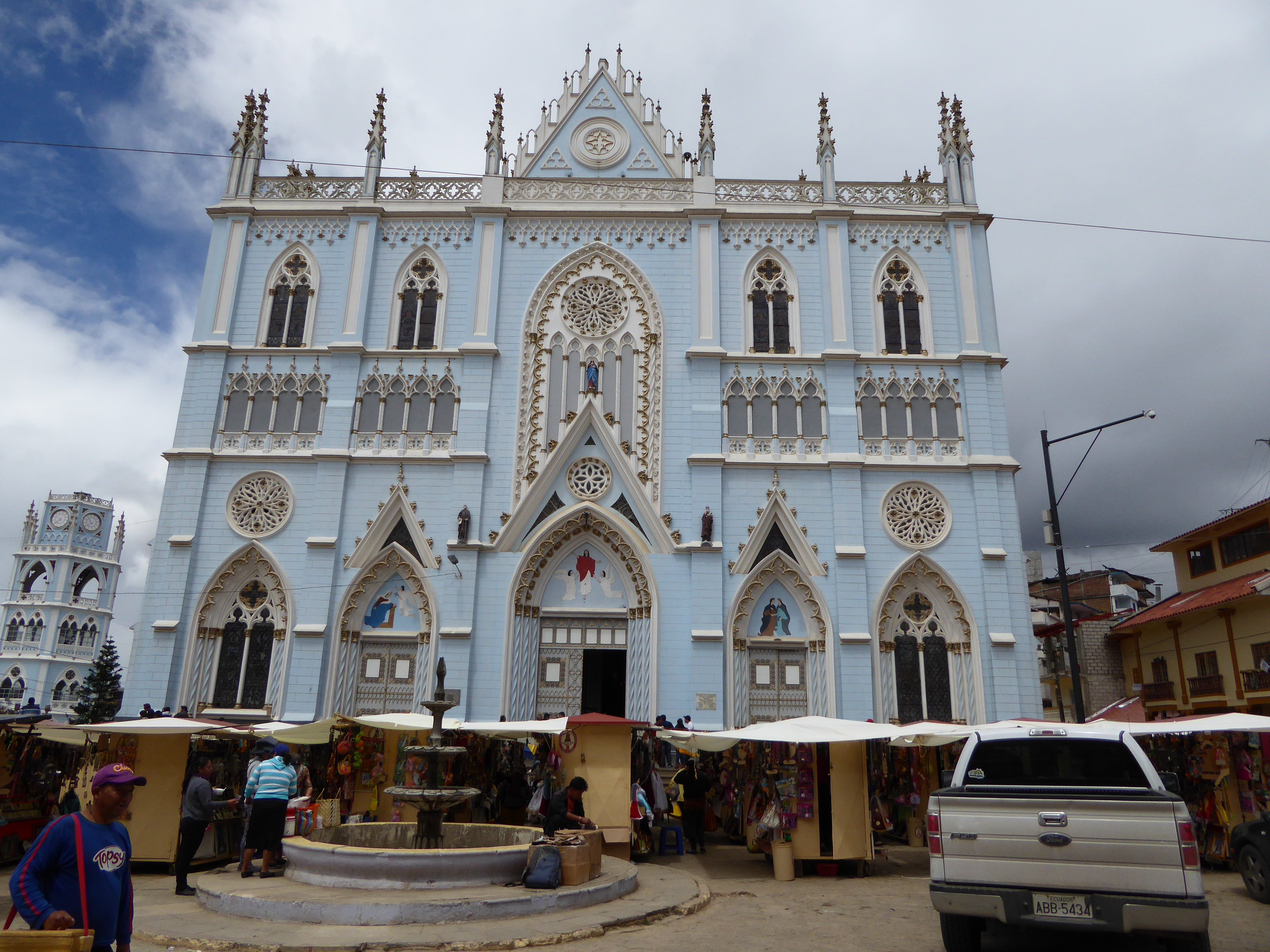 Kathedrale El Santuario